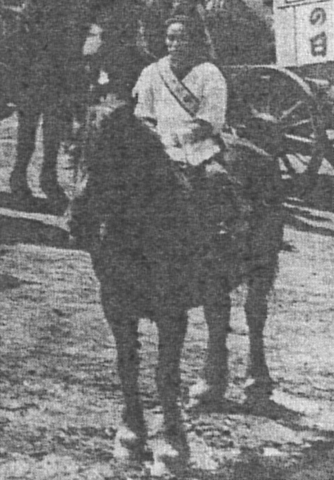 Nakagawa Ise (Japanese, *1901, †2007)